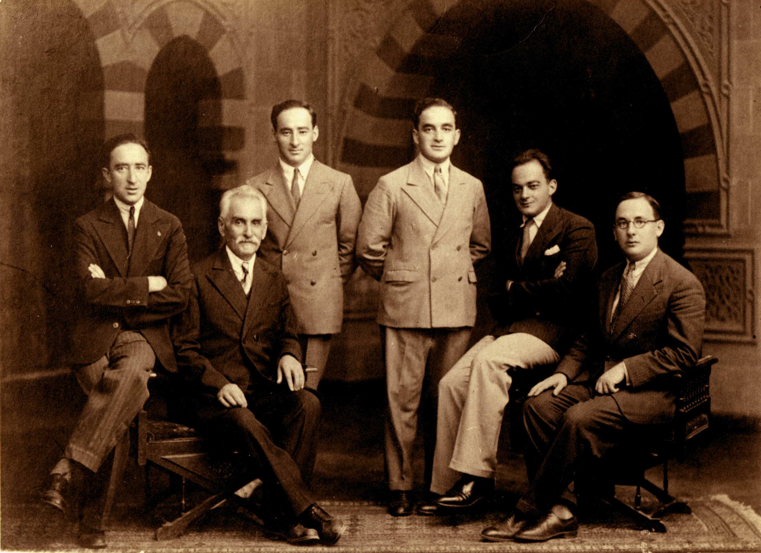 מיכאל בלחובסקי (יושב) והאחים לבית בלחובסקי (משמאל לימין): זלמן, מיכאל,אברהם, דוד, שמואל ומשה